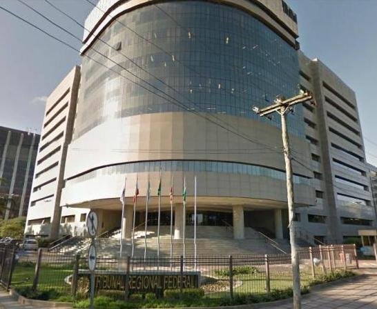 Prédio do tribunal regional federal da 4 região